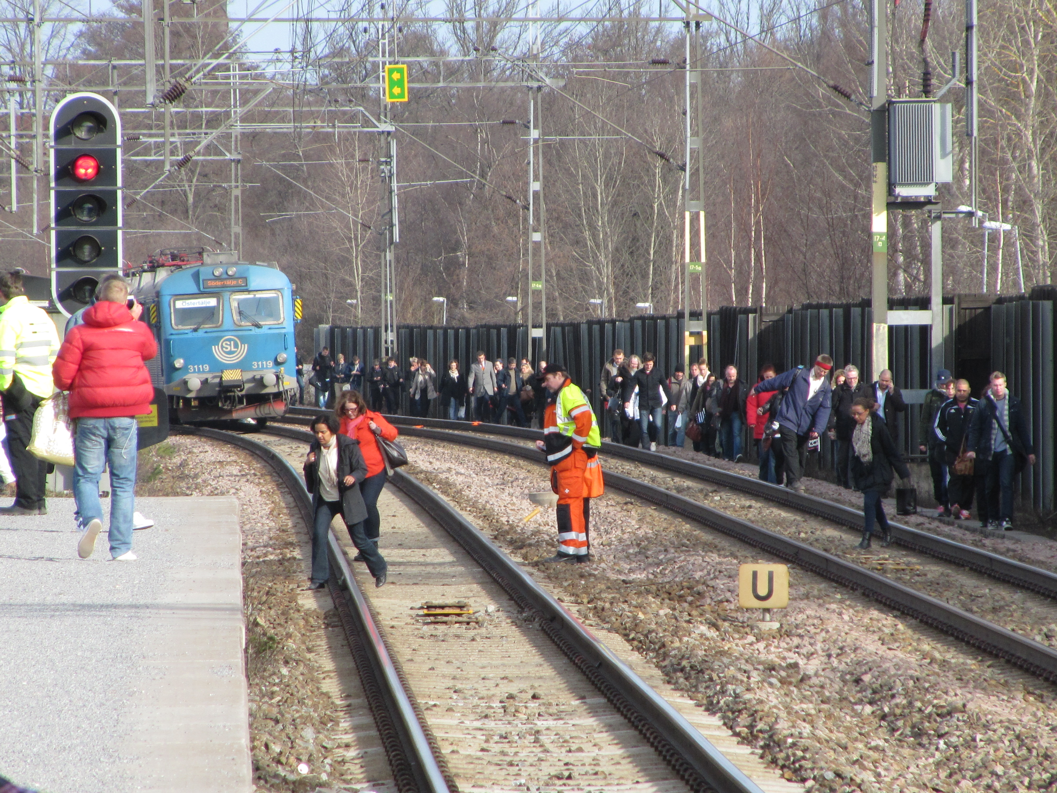 Evakuering av pendeltåg 27 mars 2012 vid Norrvikens station. Söder om stationen hade kontaktledningen rivits ned. Jag var med på tåget som stod stilla i en och en halv timme innan evakueringen sattes igång.